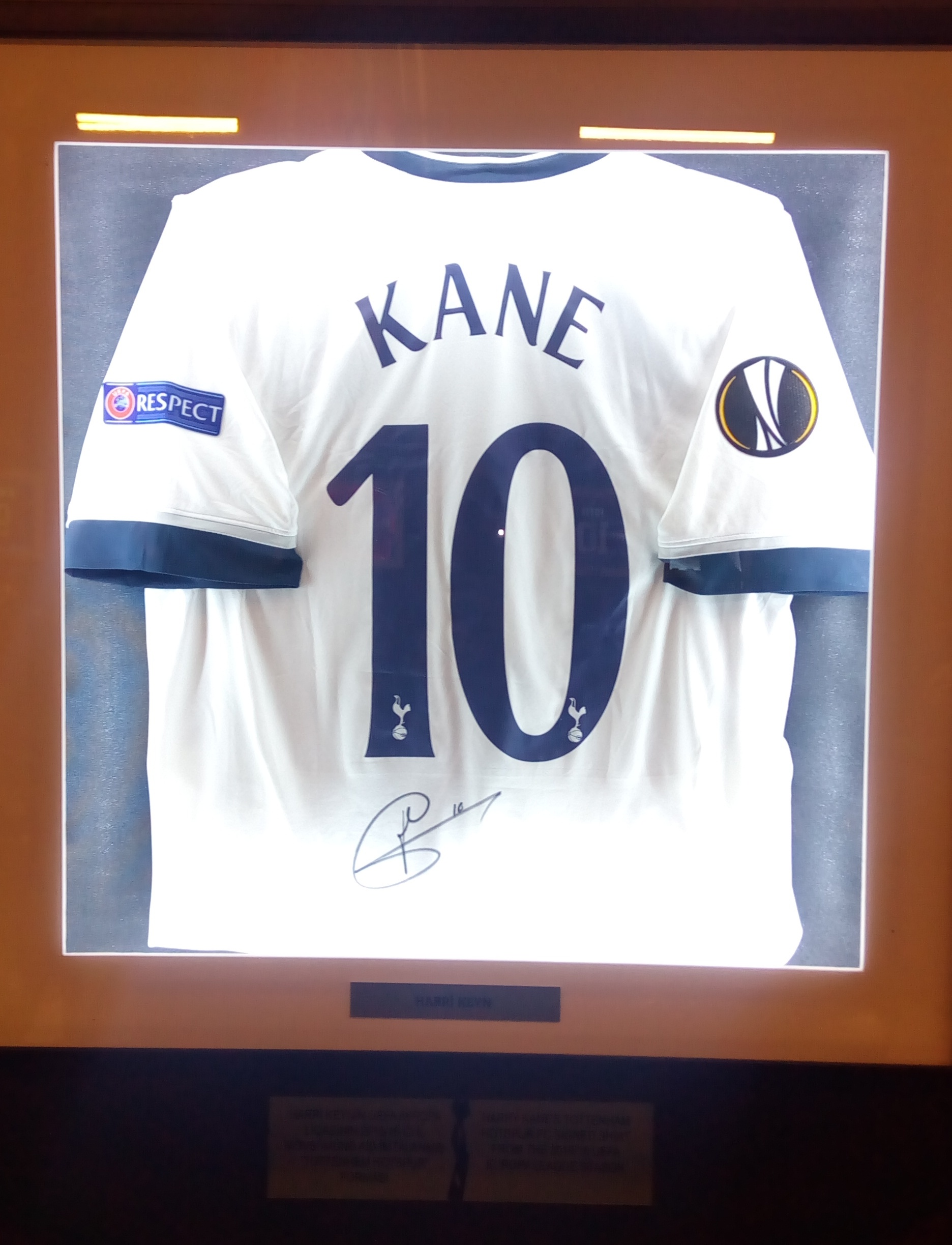 Avropa Liqası Muzeyi Bakıda